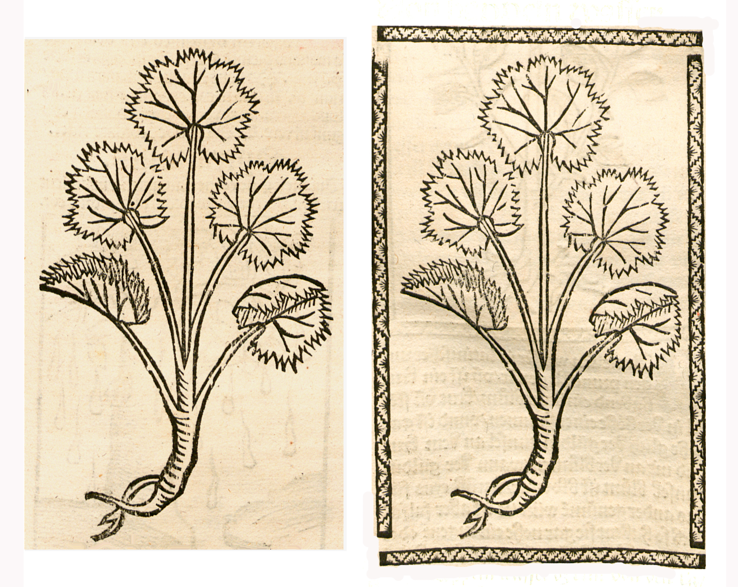 Abbildung von: Malven